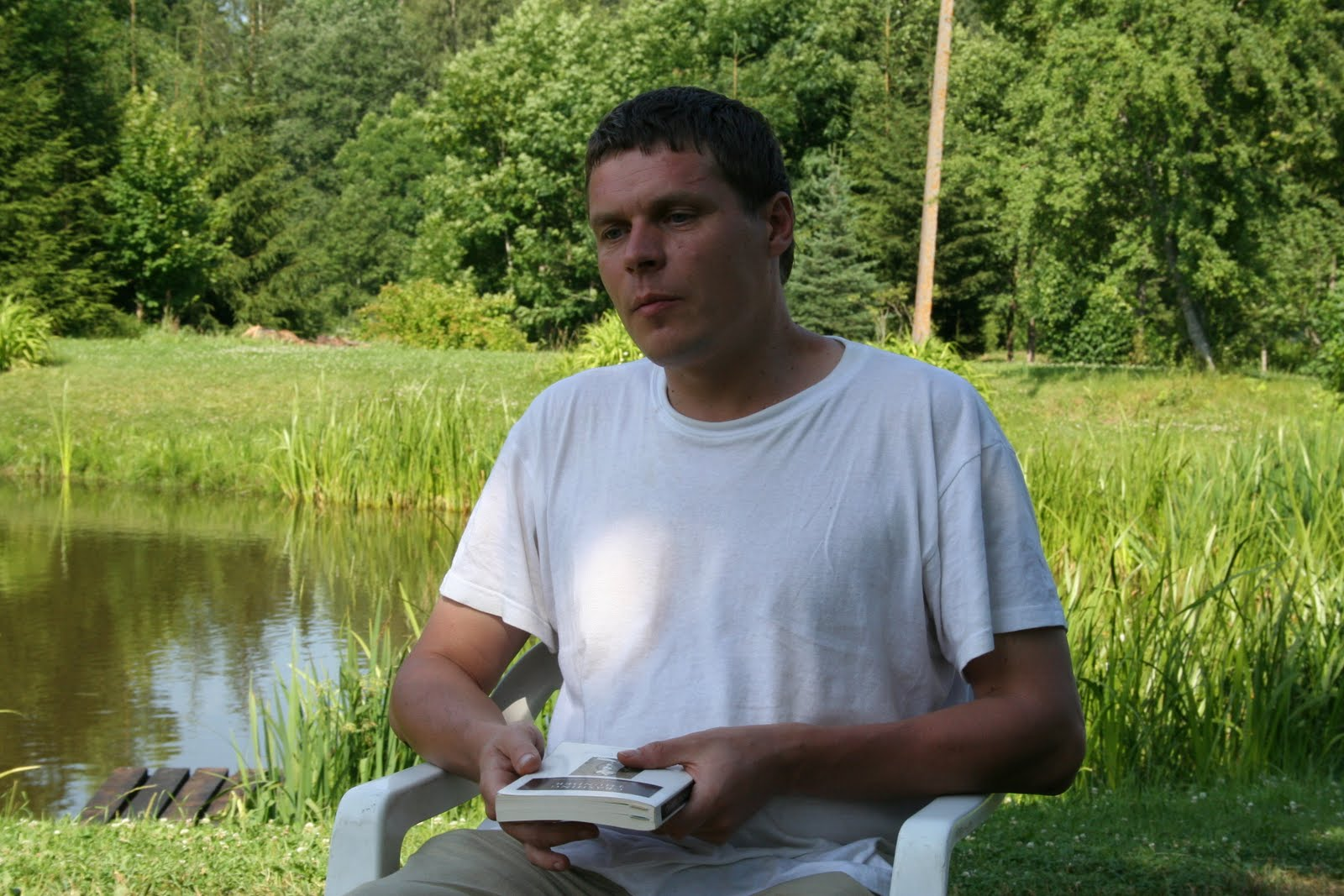 Hasso Krull räägib Põhja-Ameerika indiaanlaste antropoloogiast Otepää külje all Ketta talus Tartu NAK-i seminaril Lätete Pääl.